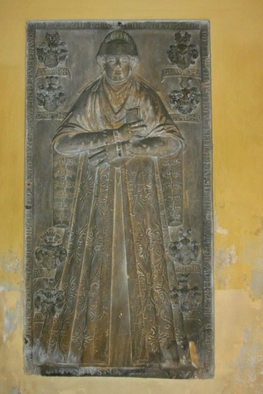 Naczęsławice (dawna Groß Nimsdorf) – wieś w Polsce położona w województwie opolskim, w powiecie kędzierzyńsko-kozielskim, w gminie Pawłowiczki.